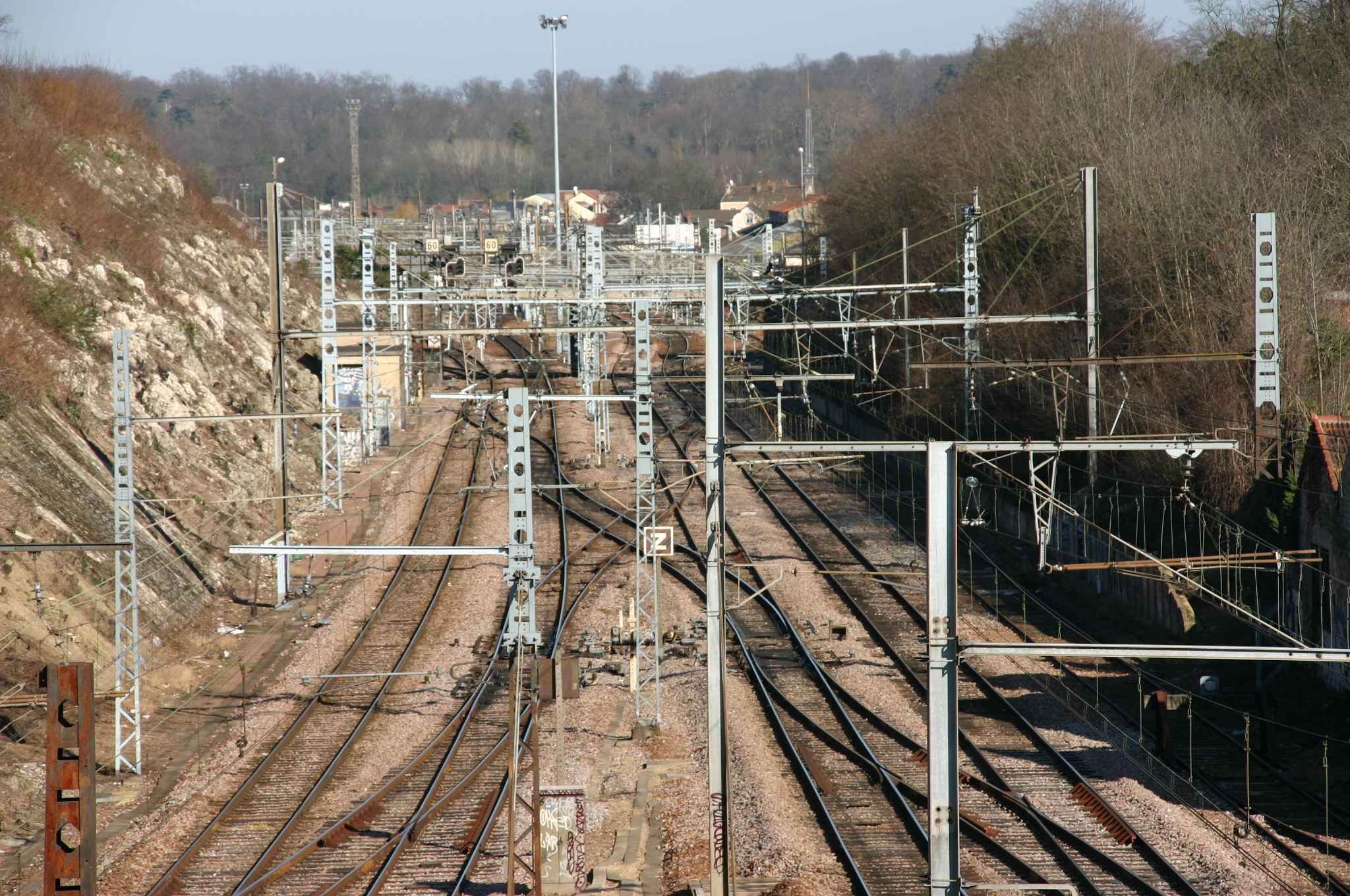 Les lignes de Corbeil à Montereau (à gauche) et de Corbeil à Malesherbes (à droite) au sud de la gare de Corbeil-Essonnes, Corbeil-Essonnes, département de l'Essonne (France)